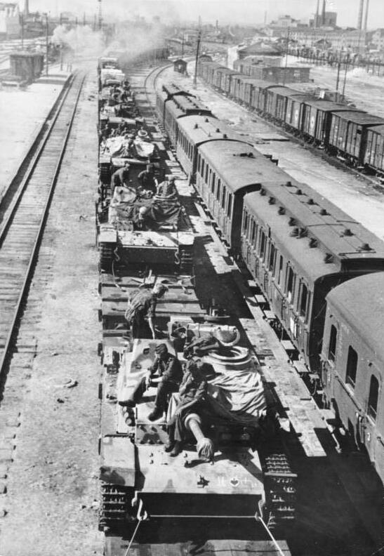 Die deutsche Front im Osten Unaufhörlich rollt der Nachschub nach dem Osten. Sturmgeschütze auf dem Transport zur Front. [August 1943]